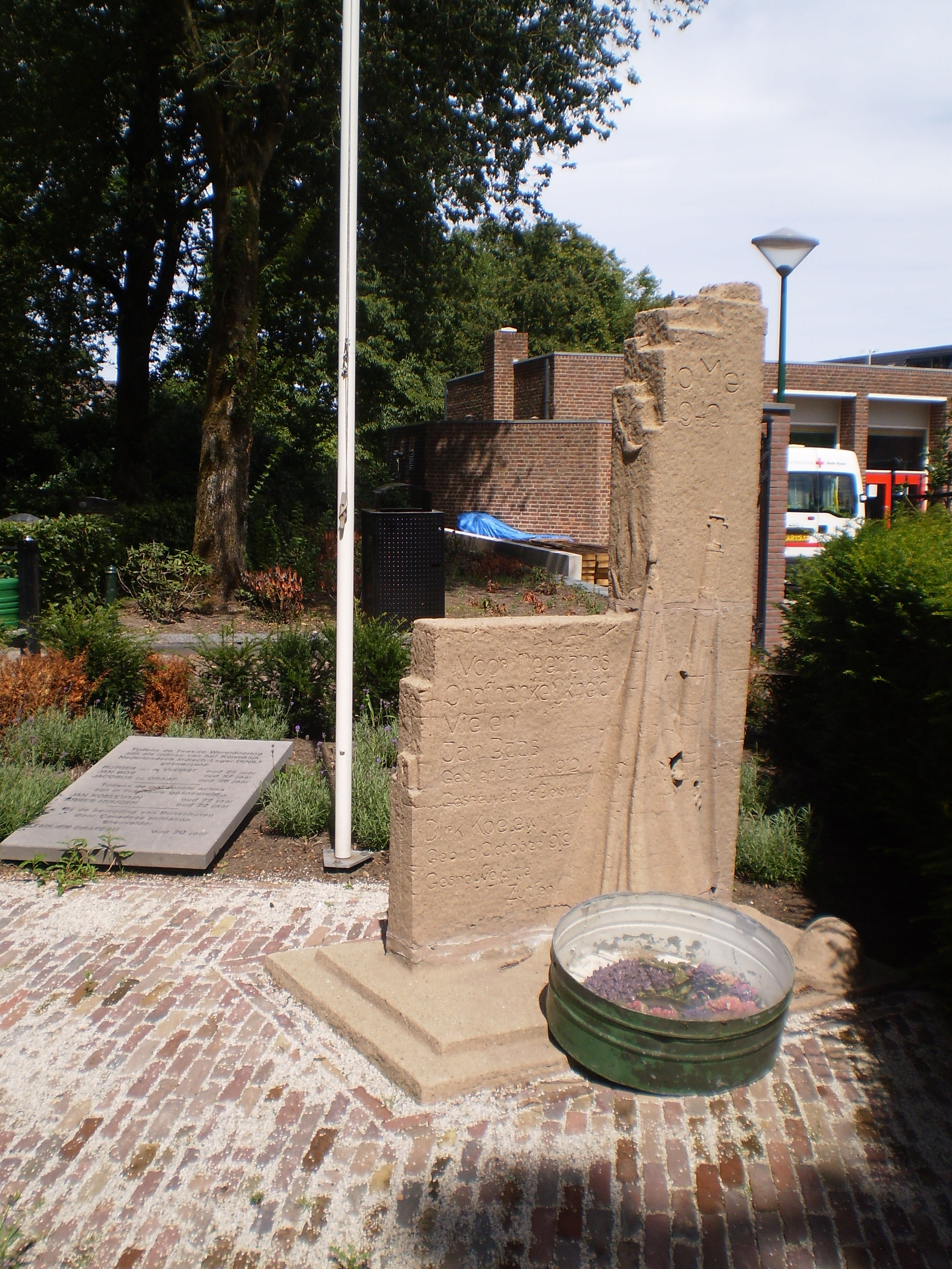 Grafmonument met trommel en gedenksteen op begraafplaats Momento Mori in Bunschoten. Op de ene zijde van het gedenkteken staat de tekst Voor Neerlands onafhankelijkheid vielen Jan Baas, gesneuveld te Bleiswijk - Dirk Koelewijn, gesneuveld te Zutfen en op de andere zijdeEen laatste hulde aan onze gevallen helden. Mijn vaderland getrouwe blijf ik tot in den doet. Baas en Koelewijn sneuvelden beiden op 10 mei 1940, de eerste dag dat de Duitsers Nederland binnen vielen. Op de bij het monument grafsteen staan de namen van gesneuvelden in Nederlands-Indië en de naam van een gesneuvelde Canadees